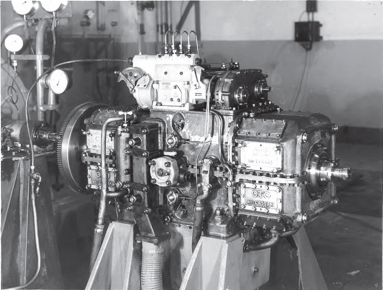 Motore aeronautico Cassani italmotor